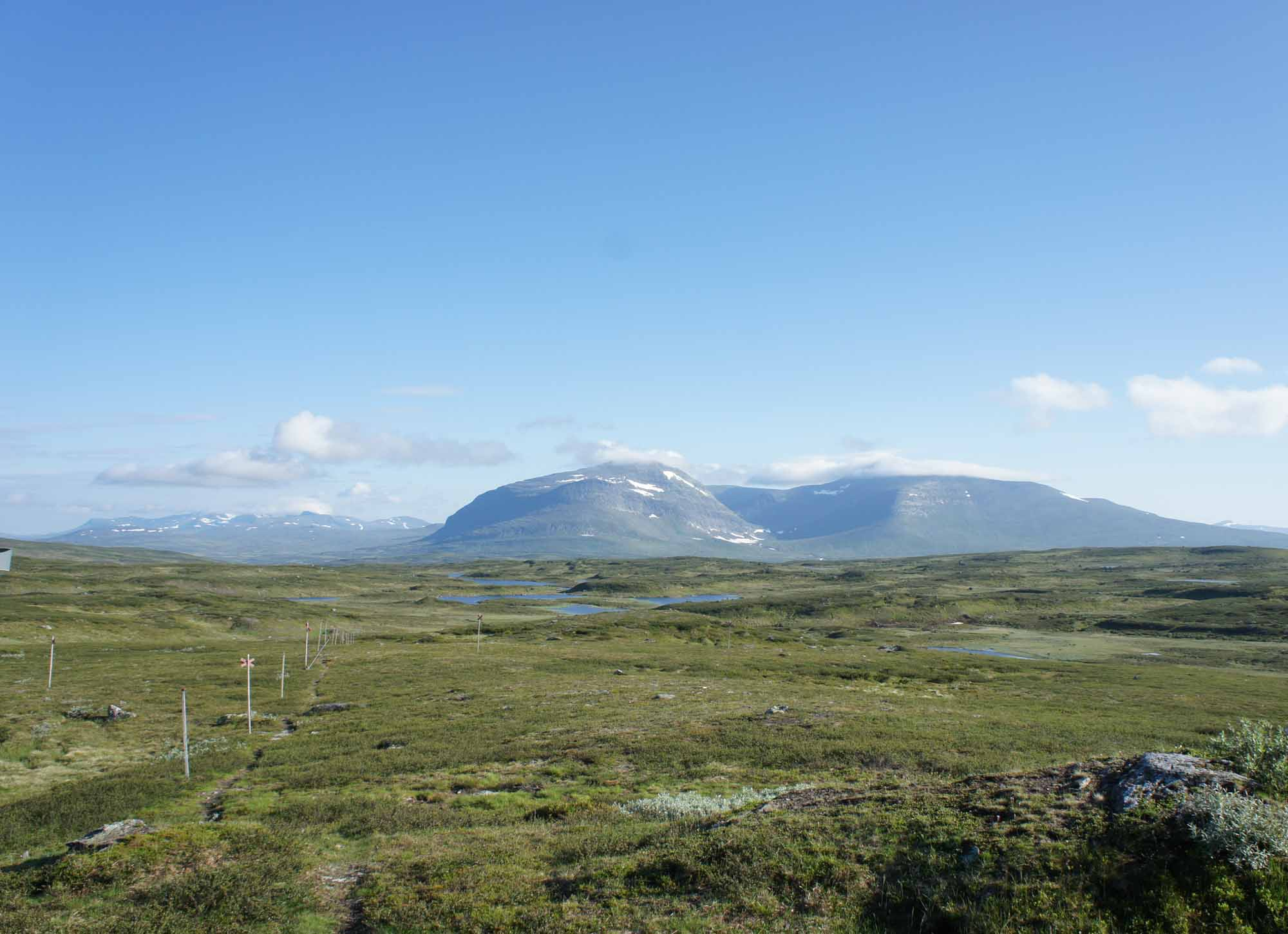 Jämtlandsleden med fjällen Helags och Predikstolen